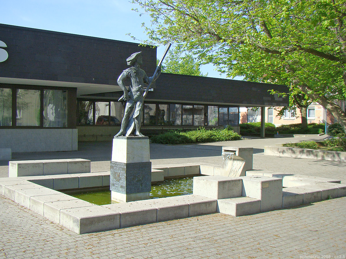 Seeräuberbrunnen von Dieter Läpple vor dem Bürgerhaus in Heilbronn-Böckingen